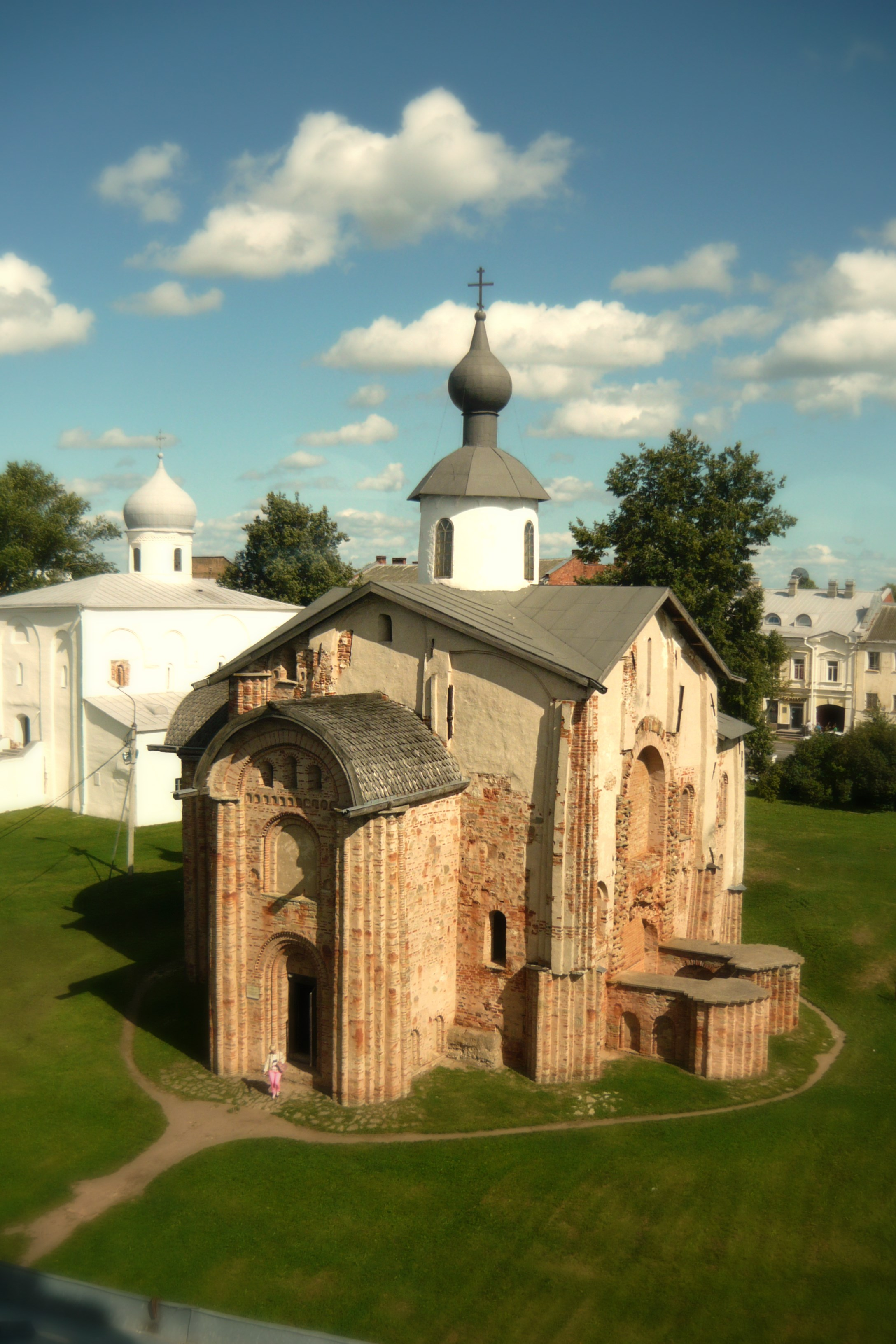 Церковь Параске́вы-Пя́тницы на Торгу входит в архитектурный комплекс Ярославова Дворища в Великом Новгороде. Представляет собой крестовокупольную, трёхнефную, четырёхстолпную постройку с одной главой и тремя апсидами (две из которых внутренние).